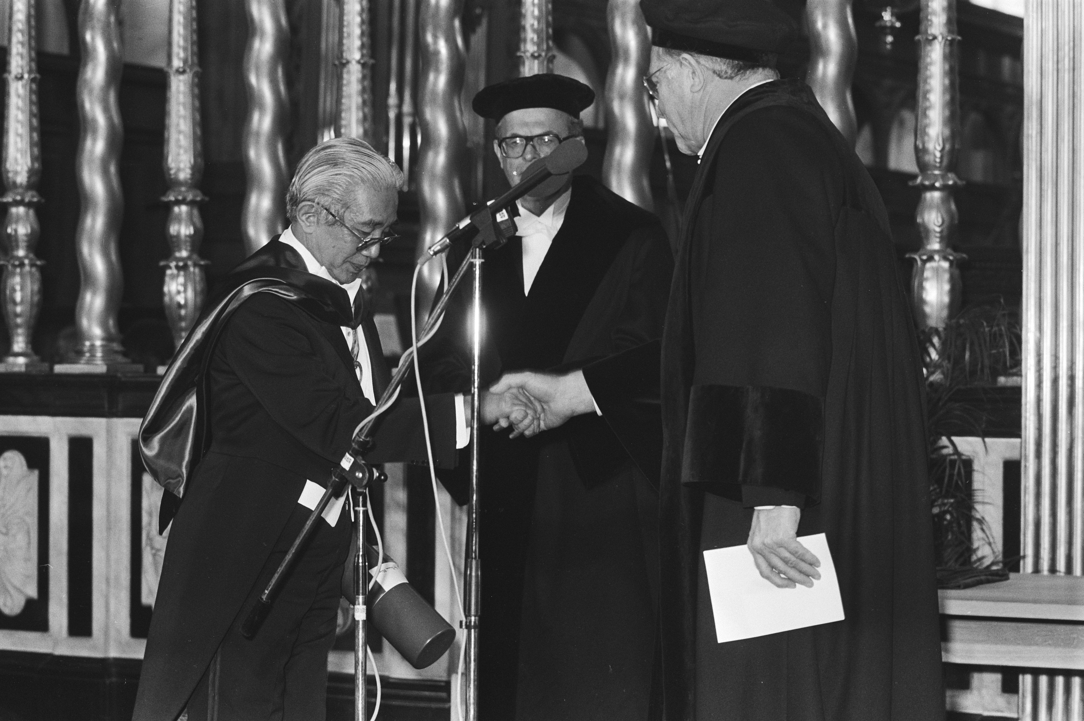 Collectie / Archief : Fotocollectie Anefo Reportage / Serie : [ onbekend ] Beschrijving : Viering 100-ste Dies Natalis VU in de Nieuwe Kerk , 21 22 mr. Yap Thiam Hien in rechtsgeleerdheid, F. E. R. de Maar , tandarts in de geneeskunde Datum : 20 oktober 1980 Trefwoorden : tandartsen, viering Persoonsnaam : Dies Natalis Vu, F. E. R. De Maar Instellingsnaam : Nieuwe Kerk Fotograaf : Bogaerts, Rob / Anefo Auteursrechthebbende : Nationaal Archief Materiaalsoort : Negatief (zwart/wit) Nummer archiefinventaris : bekijk toegang 2.24.01.05 Bestanddeelnummer : 931-0954